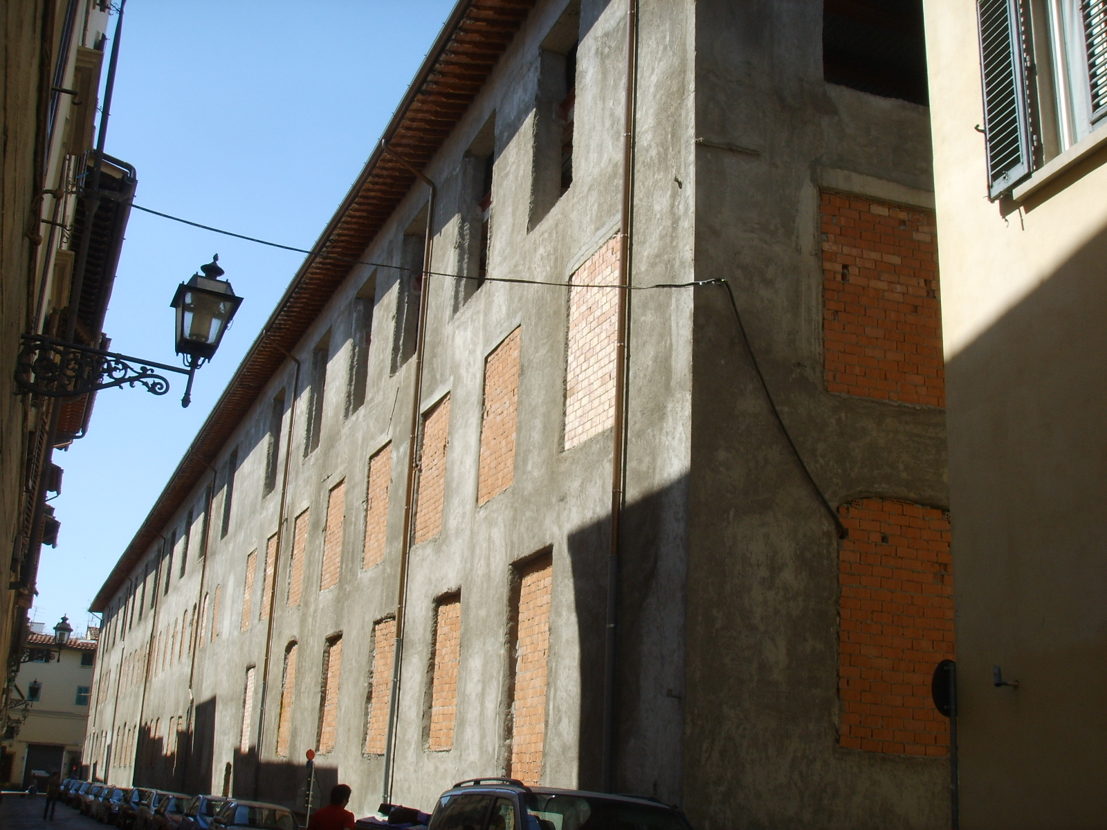 Sant'orsola firenze